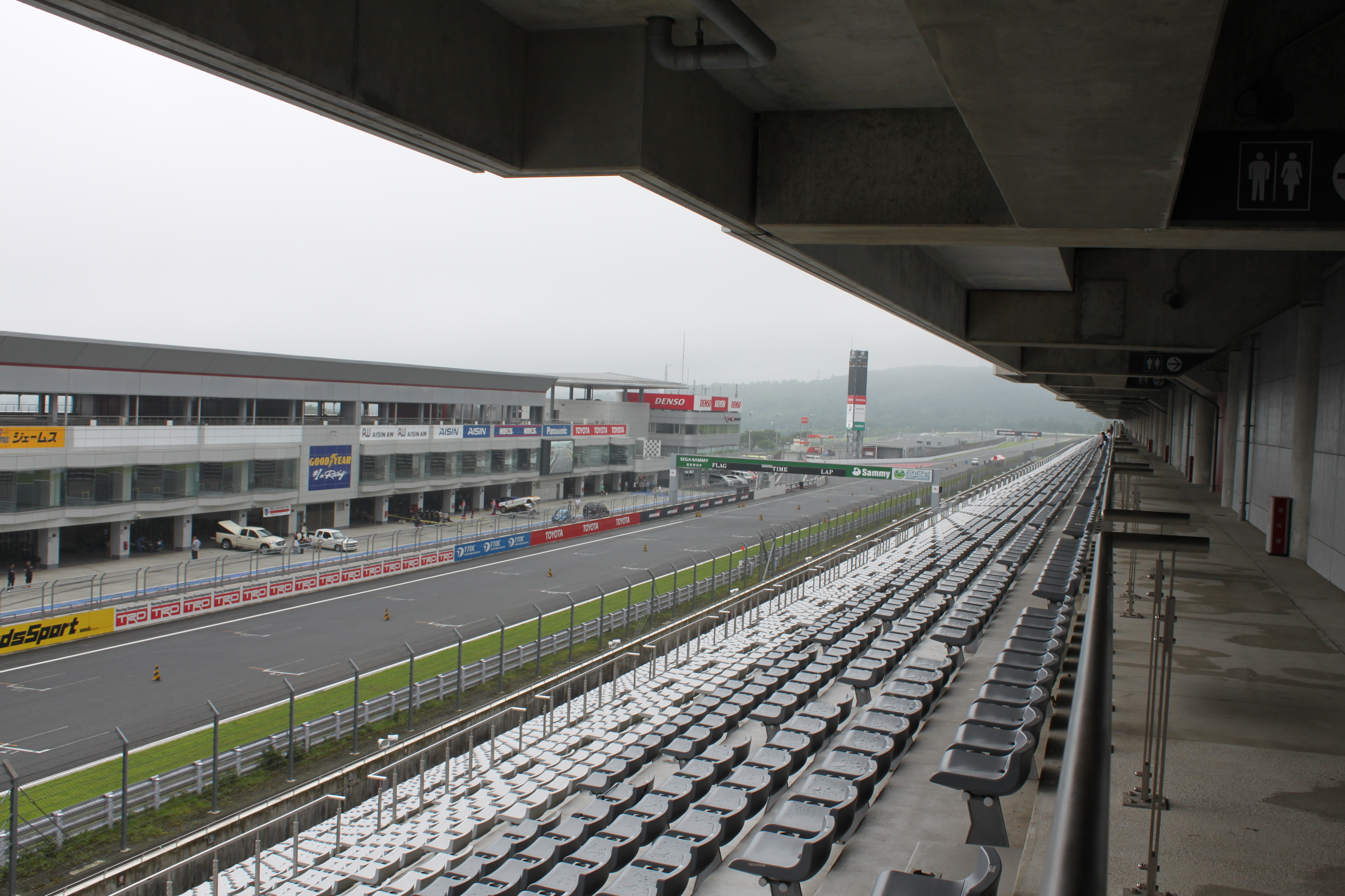 富士スピードウェイ（スタンド）